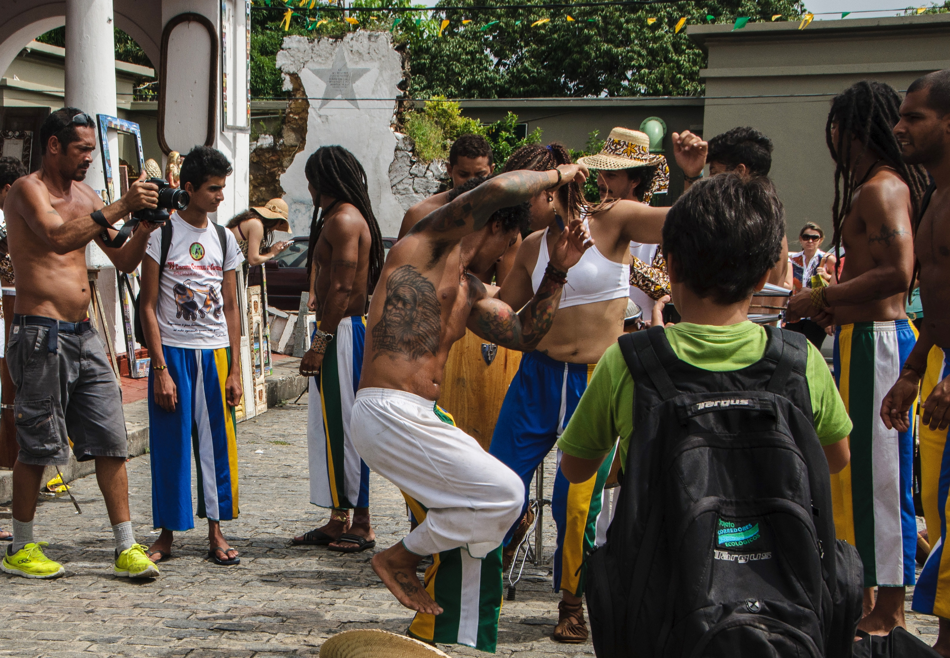 Capoeiristas em Olinda, Pernambuco, Brasil. Pernambuco é um dos berços da Capoeira.